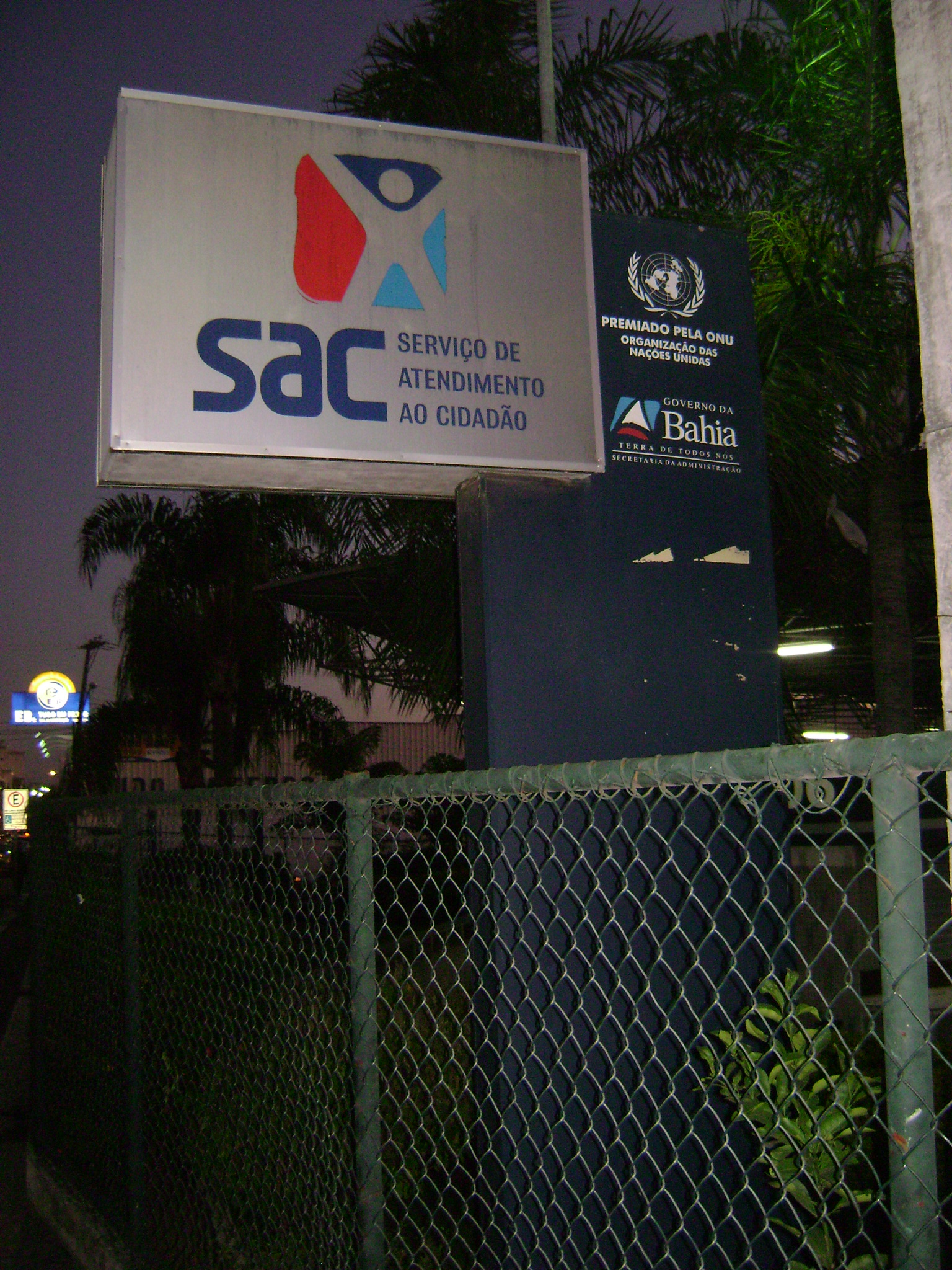 Serviço de Atendimento ao Cidadão em Feira de Santana, Bahia, Brasil.